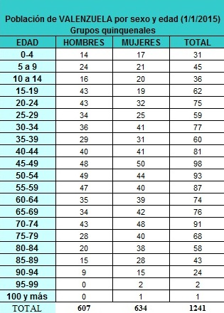 Datos quinquenales de la población de Valenzuela el día 1 de enero de 2015